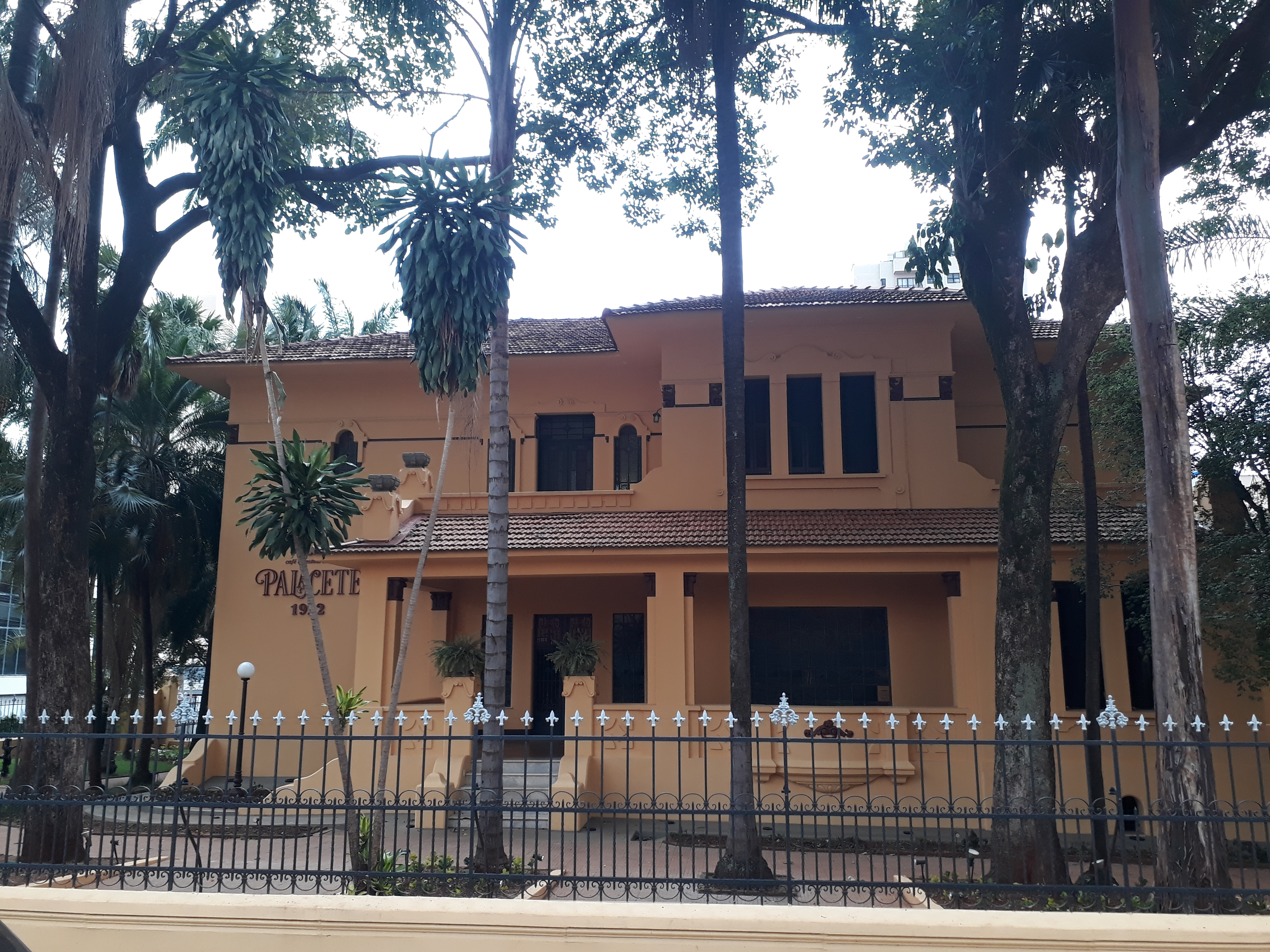 Palacete Jorge Lobato, construído em 1922, a pedido do engenheiro Jorge Lobato. Atualmente, é um restaurante e café e foi rebatizado de Palacete 1922.